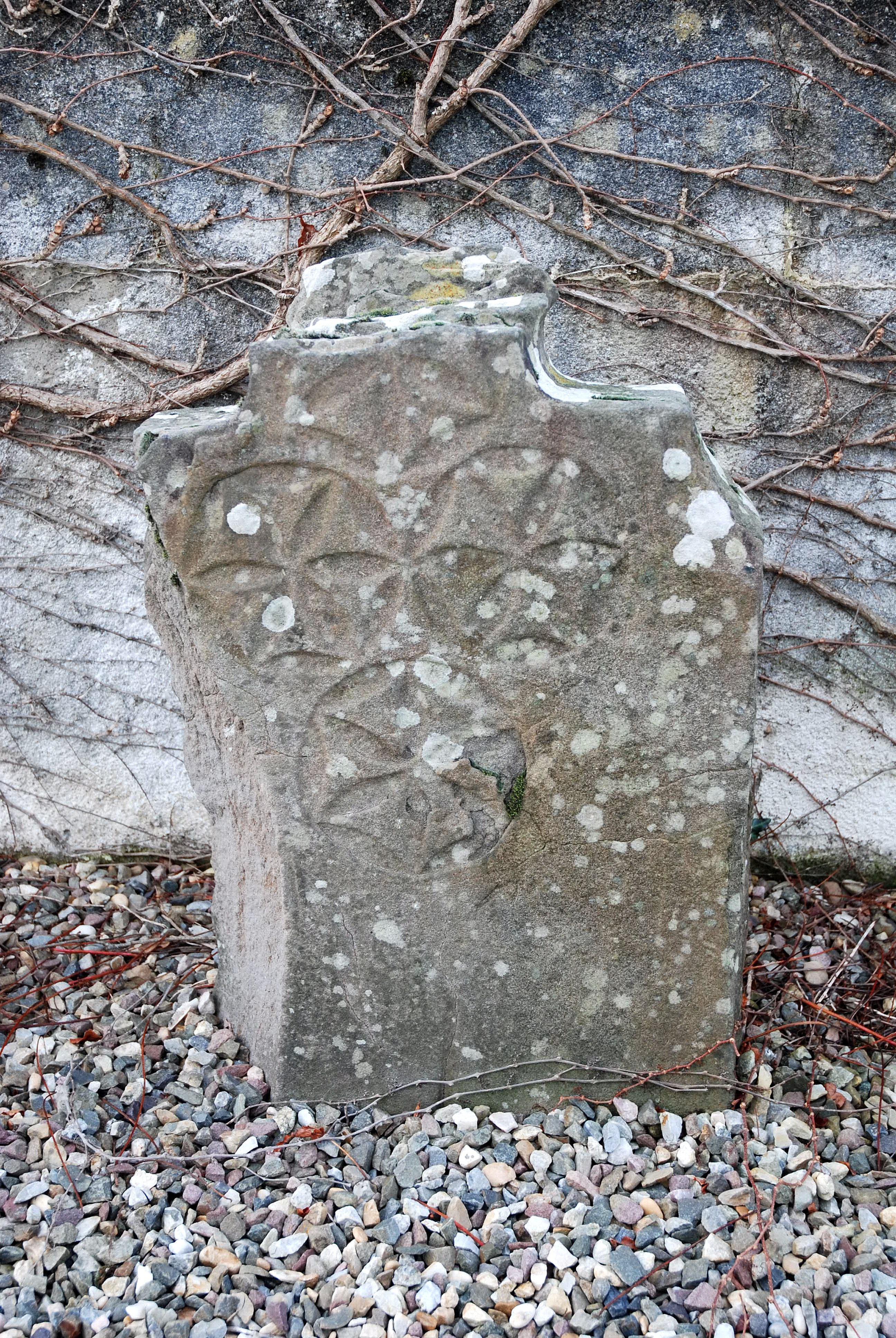 Jatxou, stèle tabulaire. Photo prise le 31/12/06 par Harrieta171